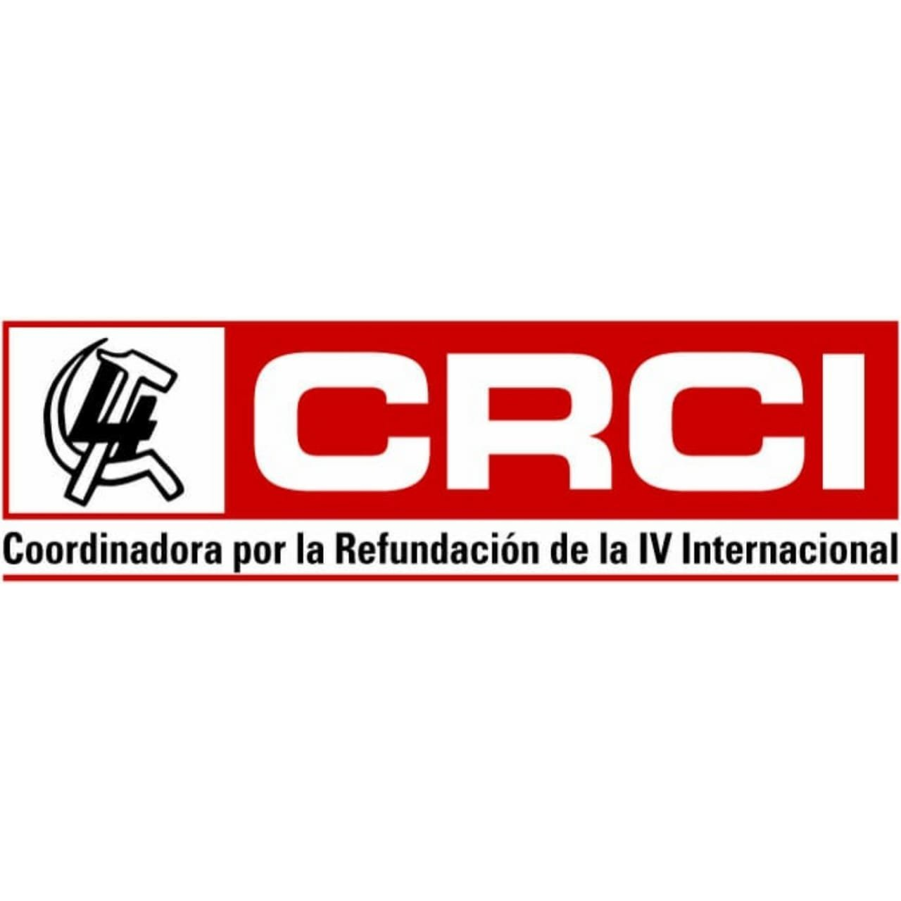 logotipo de la Coordinadora por la Refundación de la Cuarta Internacional